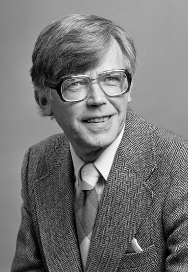 portrett, mann, historiker, professor, brystbilde.